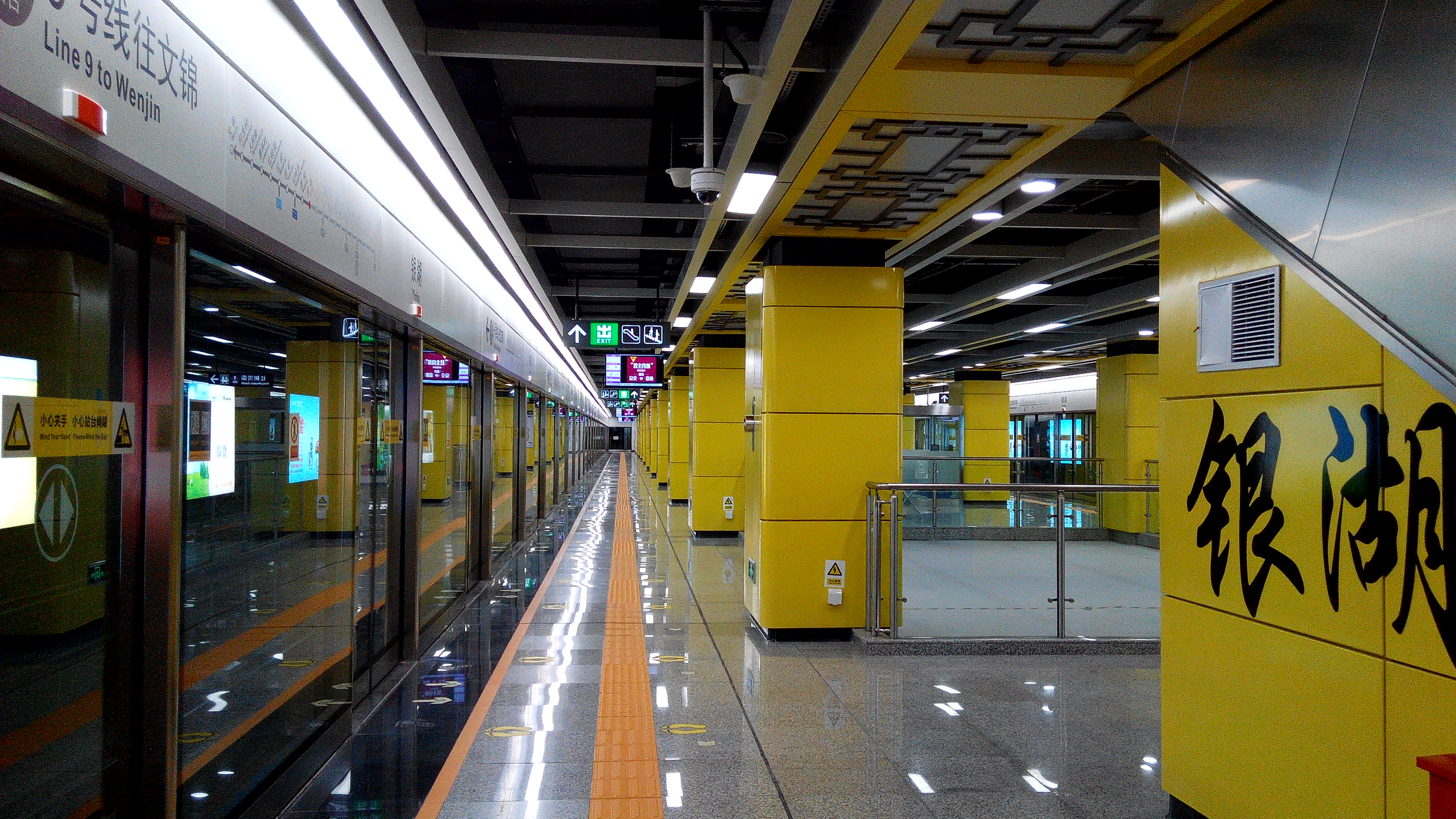 深圳地铁9号线 银湖站站台